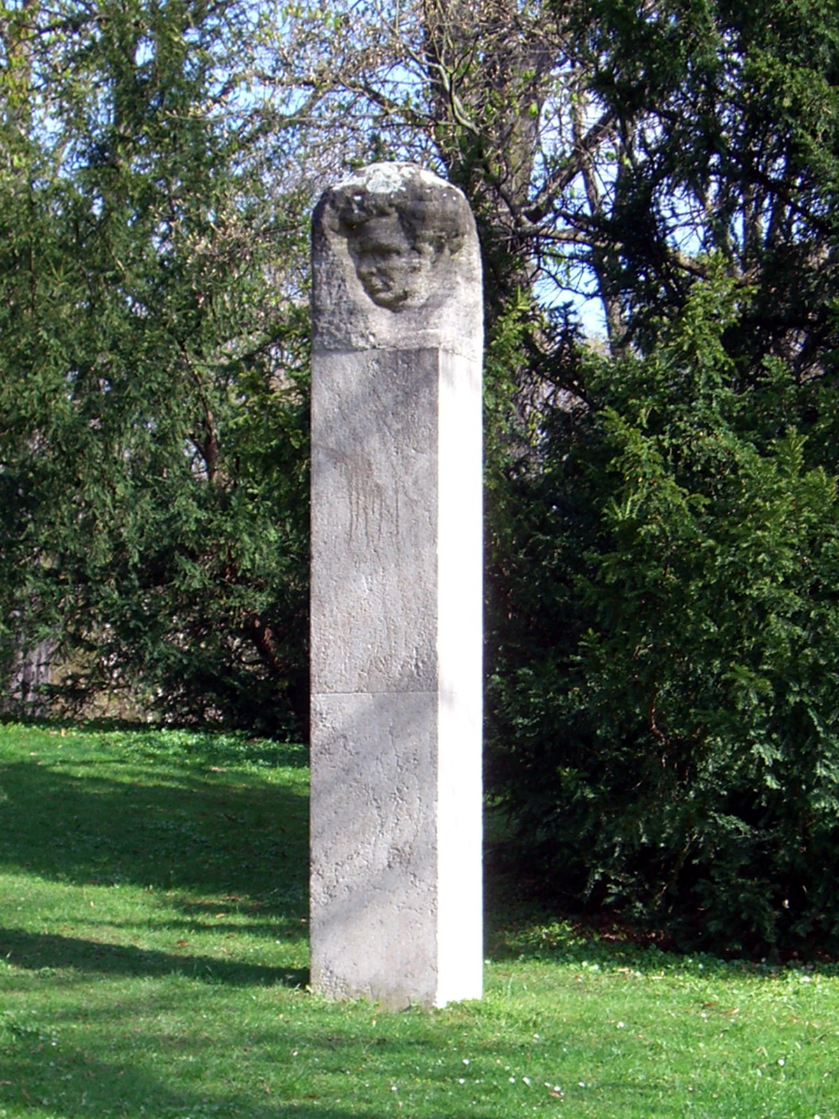 Das Franz-Schubert-Denkmal von 1929 im Leipziger Clara-Zetkin-Park (Parkteil König-Albert-Park)